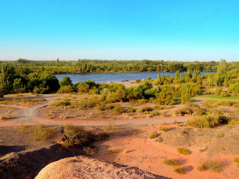 Paso Cordova cuenta con una hermosa vista. Es un Lugar ideal para ir a descansar. Foto de Javier Larrea Fotografía